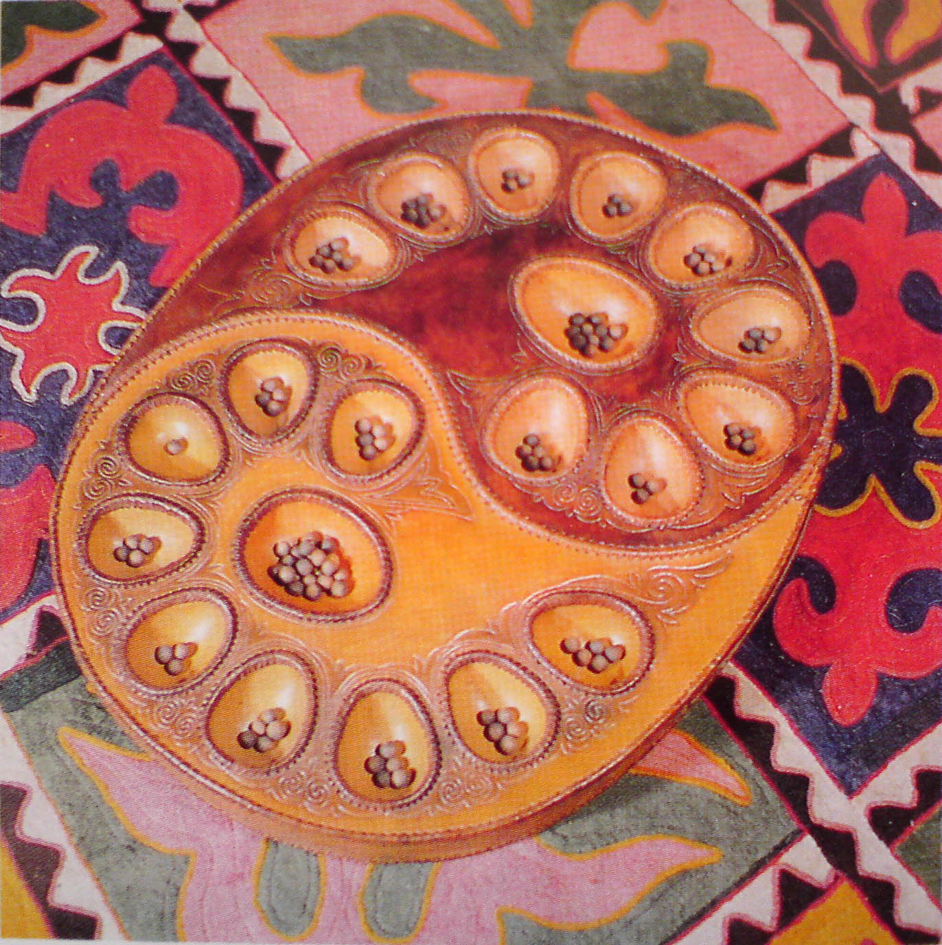 Деревянная доска для игры в тогуз коргоол